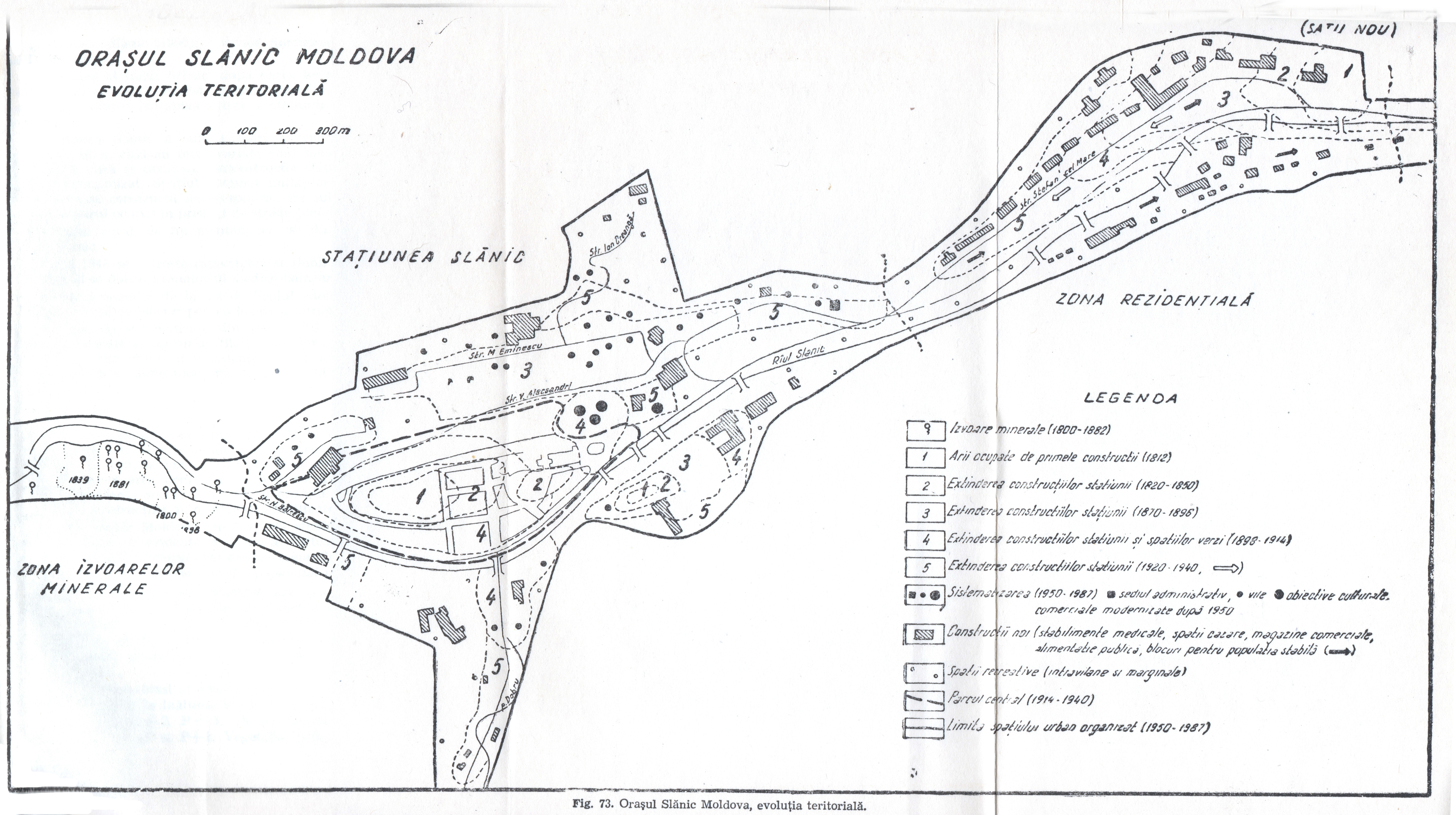 Harta evoluției teritoriale a stațiunii Slănic Moldova până în anul 1989.